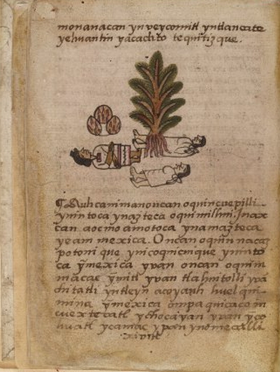 Pagina 110 del Codice Aubin